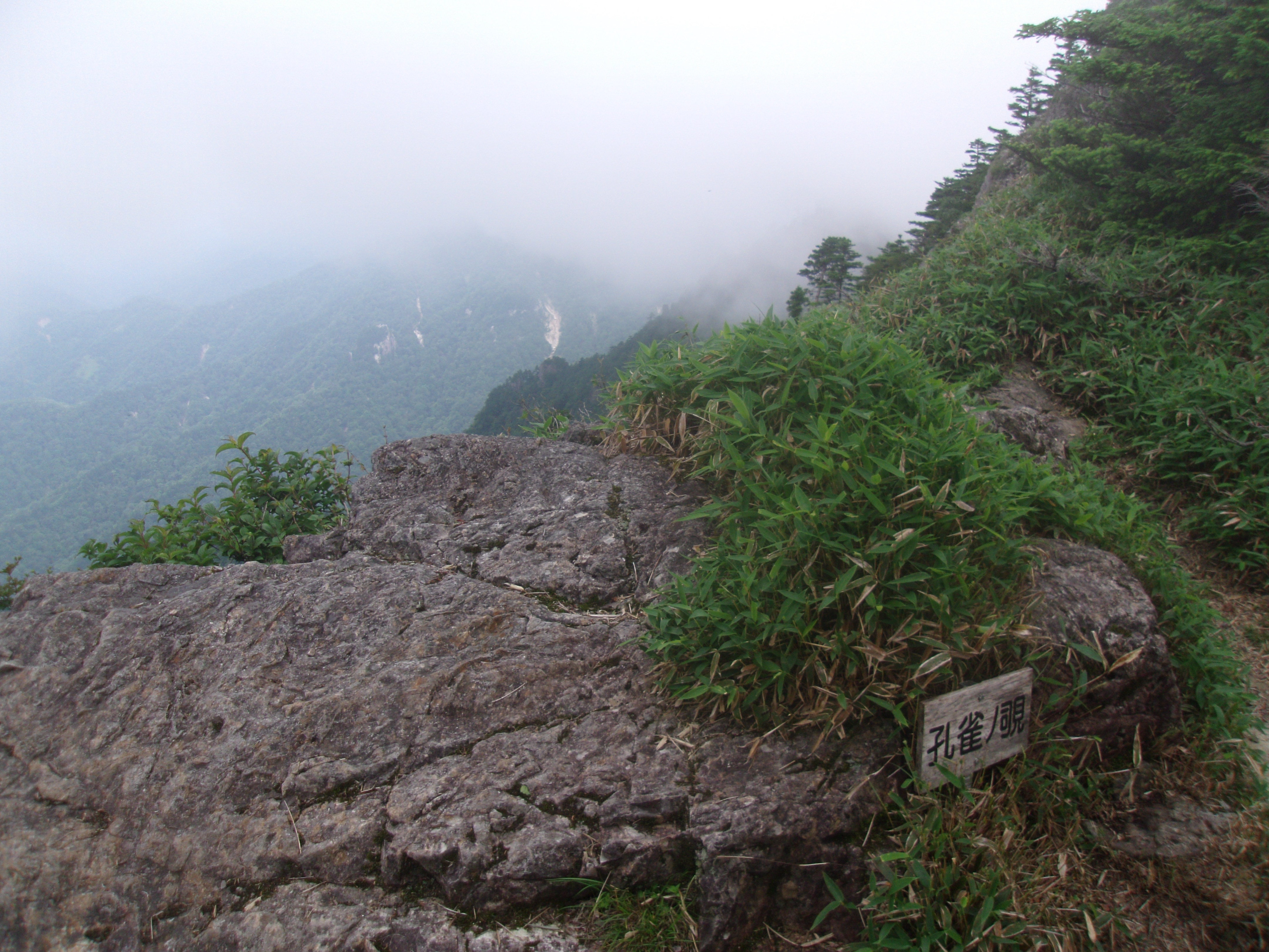 大峯奥駈道第42靡「孔雀岳」の行場・孔雀ノ覗